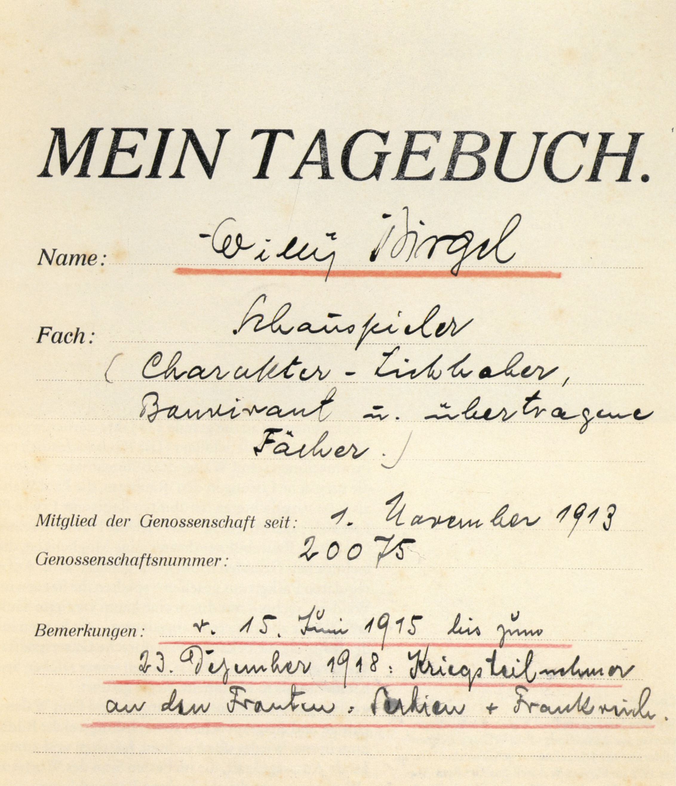 Titelblatt des Rollentagebuchs des Schauspielers Willy Birgel, mit Eintragungen aus seiner Aachener und Mannheimer Zeit 1919–1929 23,8 x 19 cm Mein Tagebuch Name: Willy Birgel Fach: Schauspieler (Charakter-Liebhaber, Bonvivant u. übertragene Fächer.) Mitglied der Genossenschaft seit: 1. November 1913 Genossenschaftsnummer: 20075 Bemerkungen: v. 15. Juni 1915 bis zum 23. Dezember 1918: Kriegsteilnehmer an den Fronten: Serbien + Frankreich. Collection: Reiss-Engelhorn-Museen, Mannheim